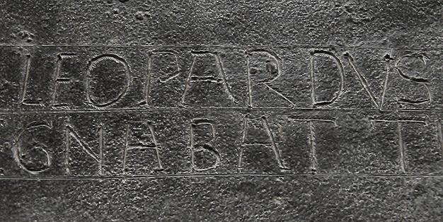 Inschrift (Detail) des Reliquienschreins des hl. Leopardus aus dem frühen 11. Jahrhundert, Aachener Dom (heute ersetzt durch den Corona-Leopardus-Schrein von 1911)